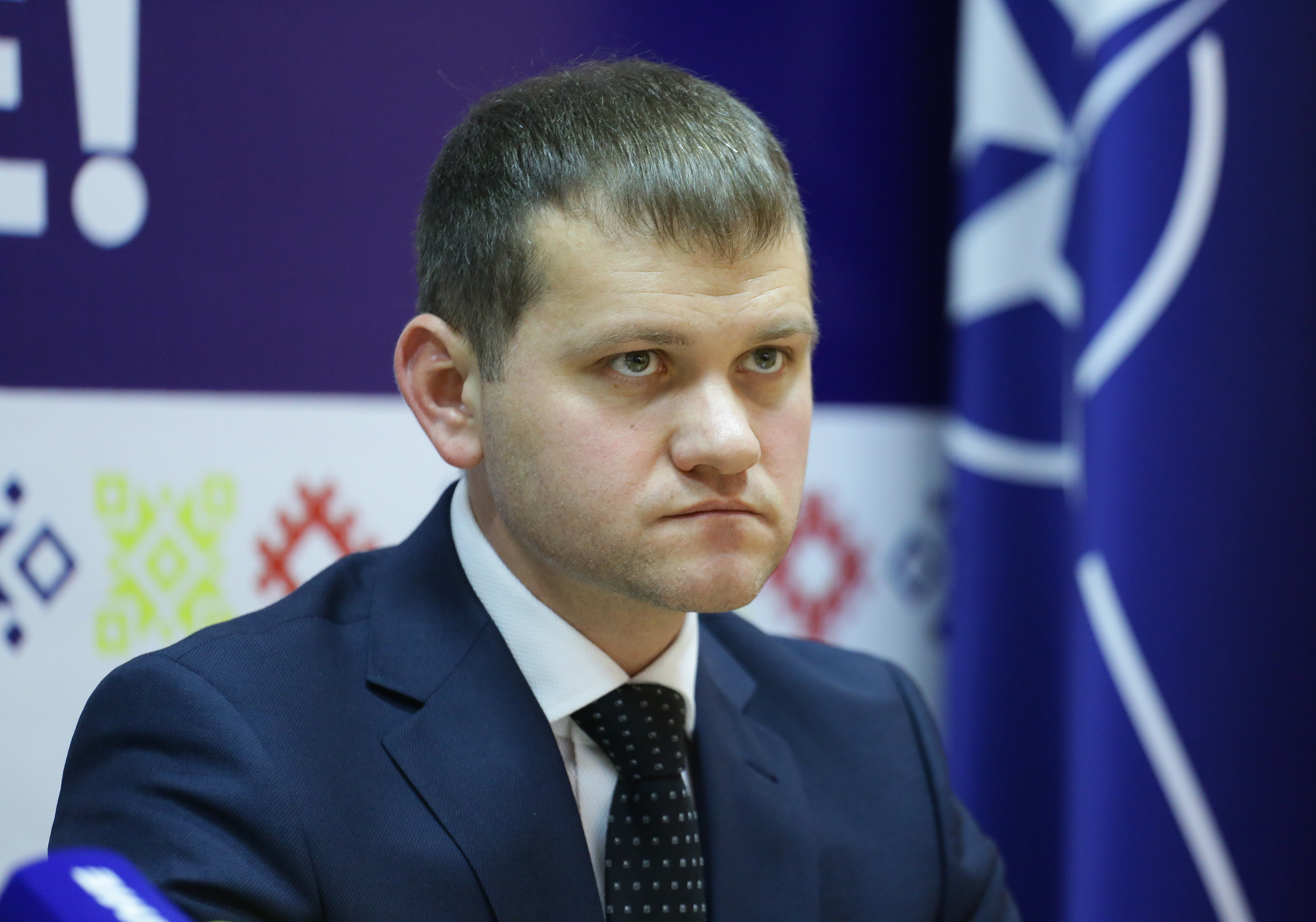 Valeriu Munteanu Partidul Liberal